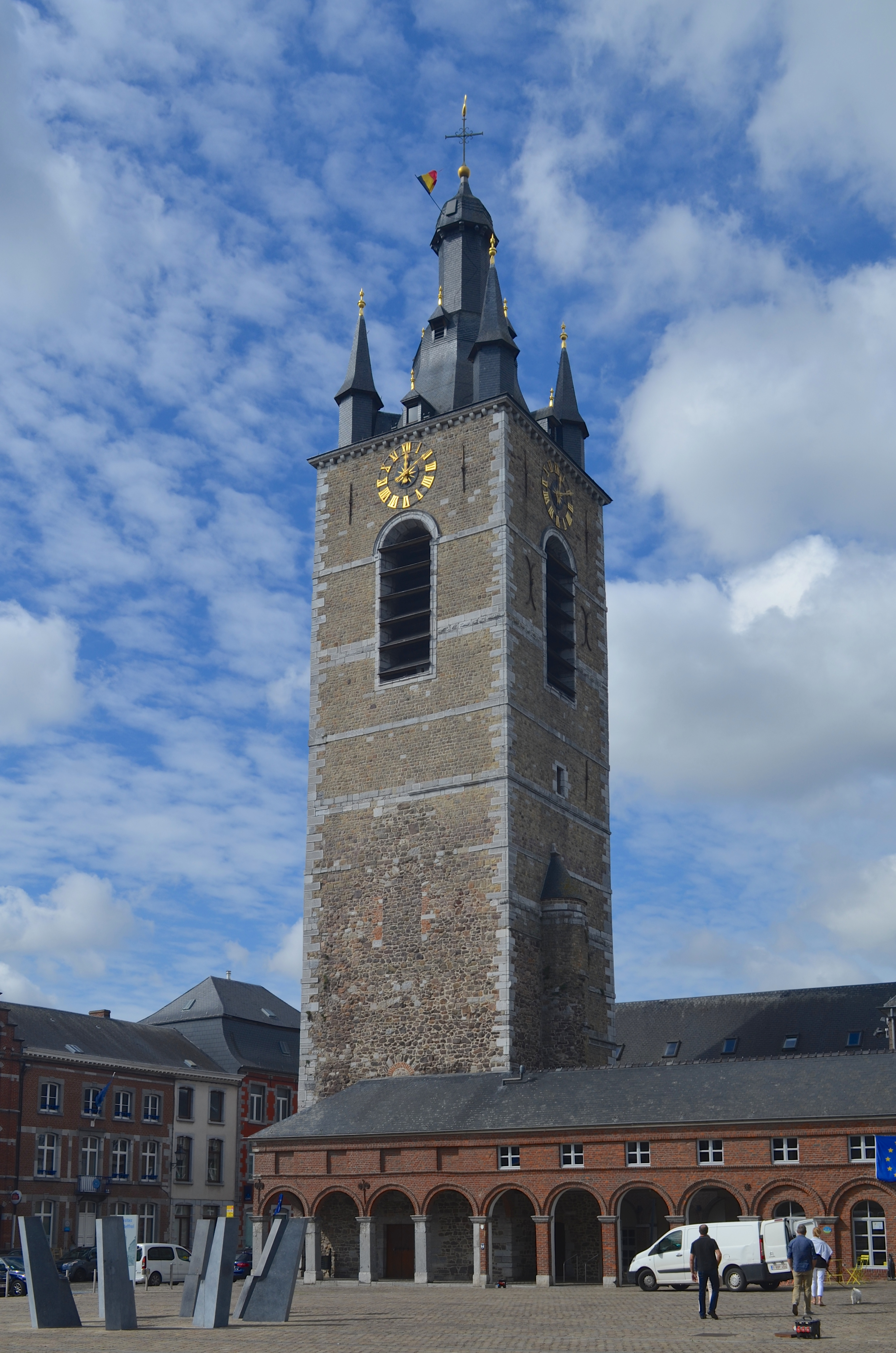 Thuin (Belgique) - Beffroi - Faces nord et est du beffroi vu depuis la place du Chapitre. This photo of immovable heritage has been taken in the Walloon Region